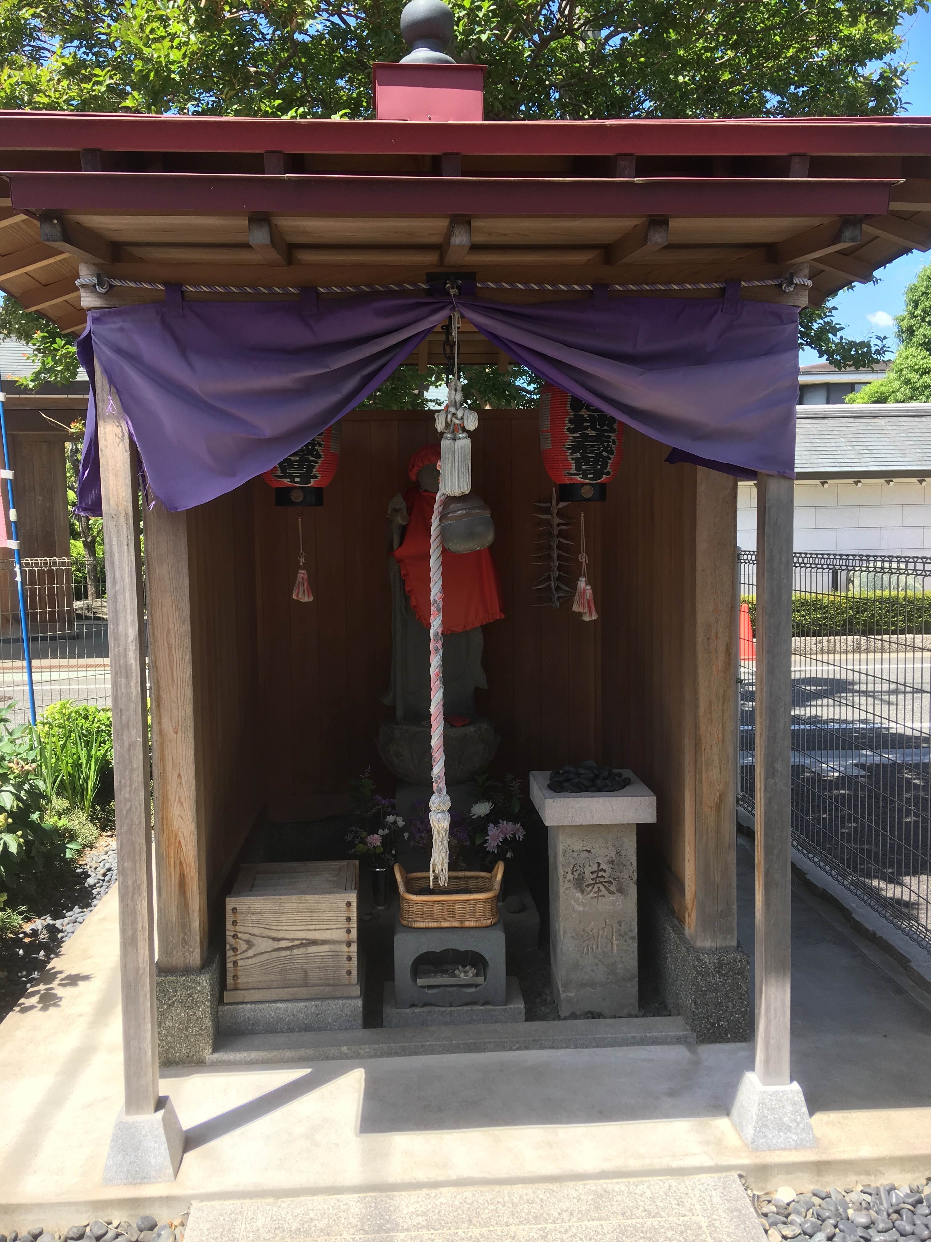 東京都世田谷区にある常在寺前にあるいぼとり地蔵尊